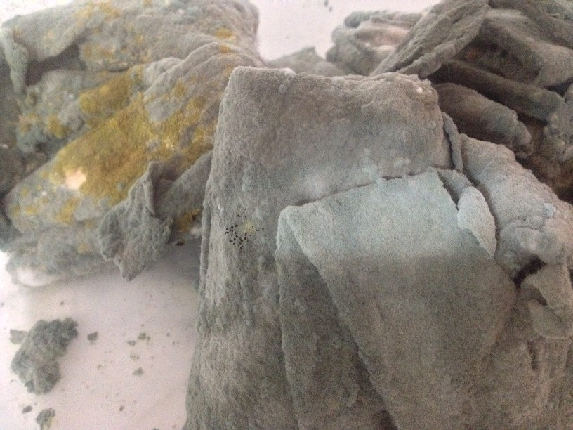 کپک نان که مدتی نزدیک به یک ماه در فضای باز رها شده‌است